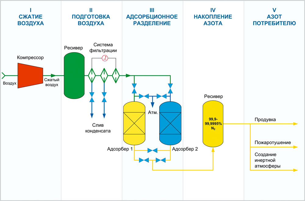 Схема работы адсорционной установки